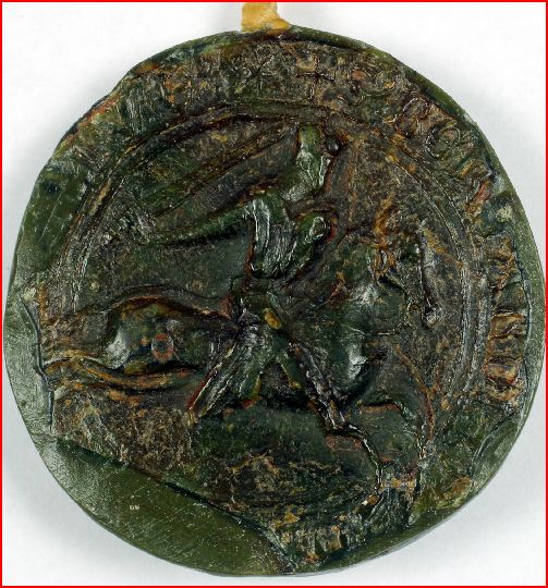 Sceau équestre de Bernard seigneur de Querrieu, chevalier (cavalier portant un heaume plat et un bouclier orné d'un lion), apposé sur une cession de rente sur le moulin de Querrieu.